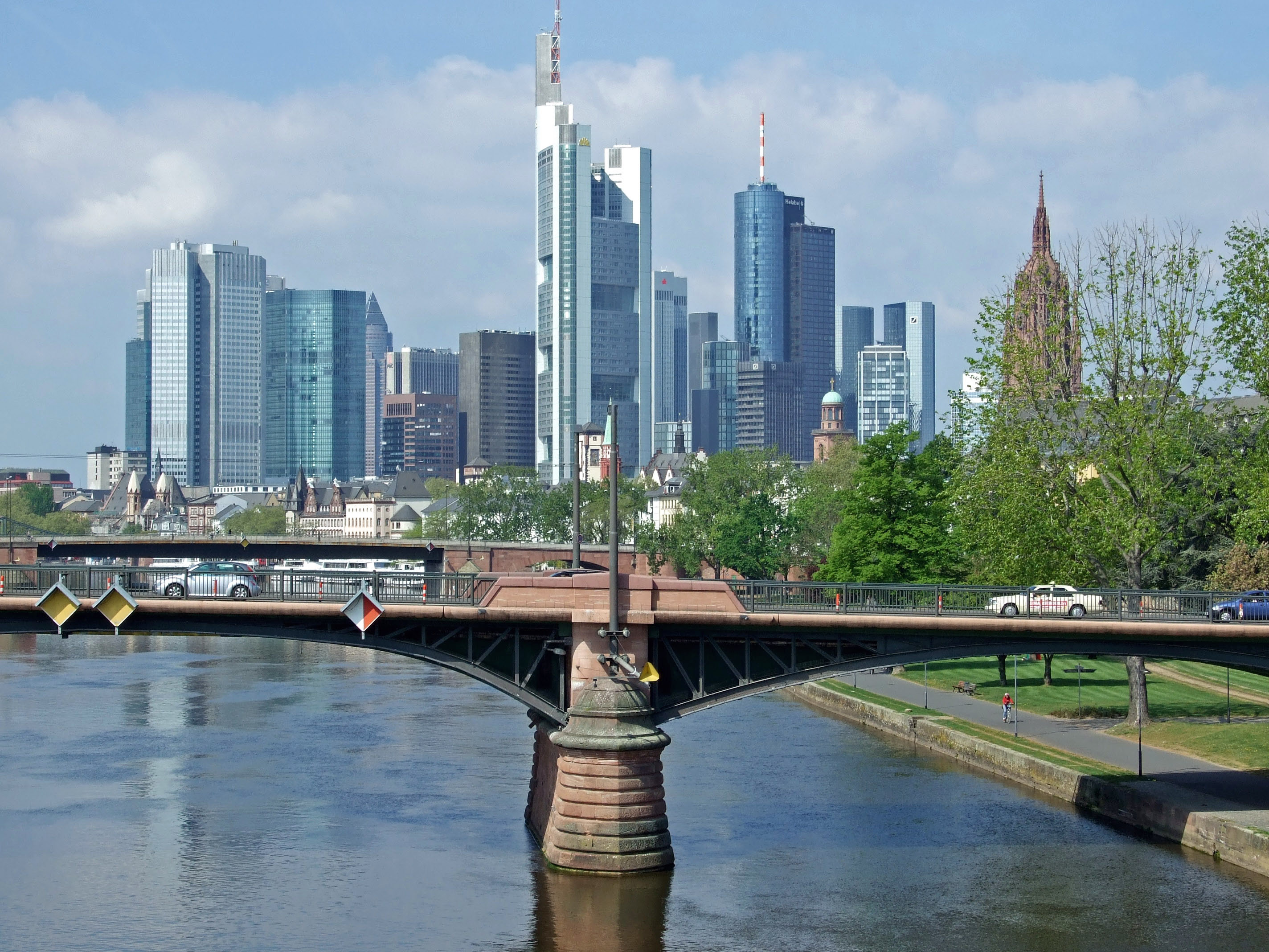 Skyline von Frankfurt, über dem Main von der „Flößerbrücke“ aus.